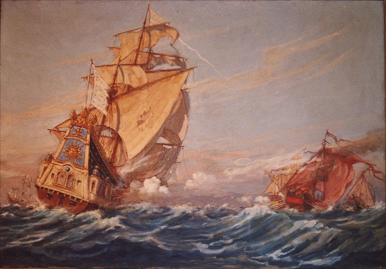 Tabelau de Paul Jobert "Le vaisseau Le Bon de la flotte de Louis XIV à la poursuite des corsaires barbaresques", huile sur toile, 94 X 140 cm.